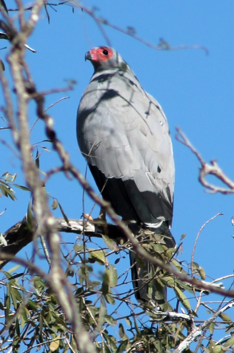 Holenkiekendief, Reniala